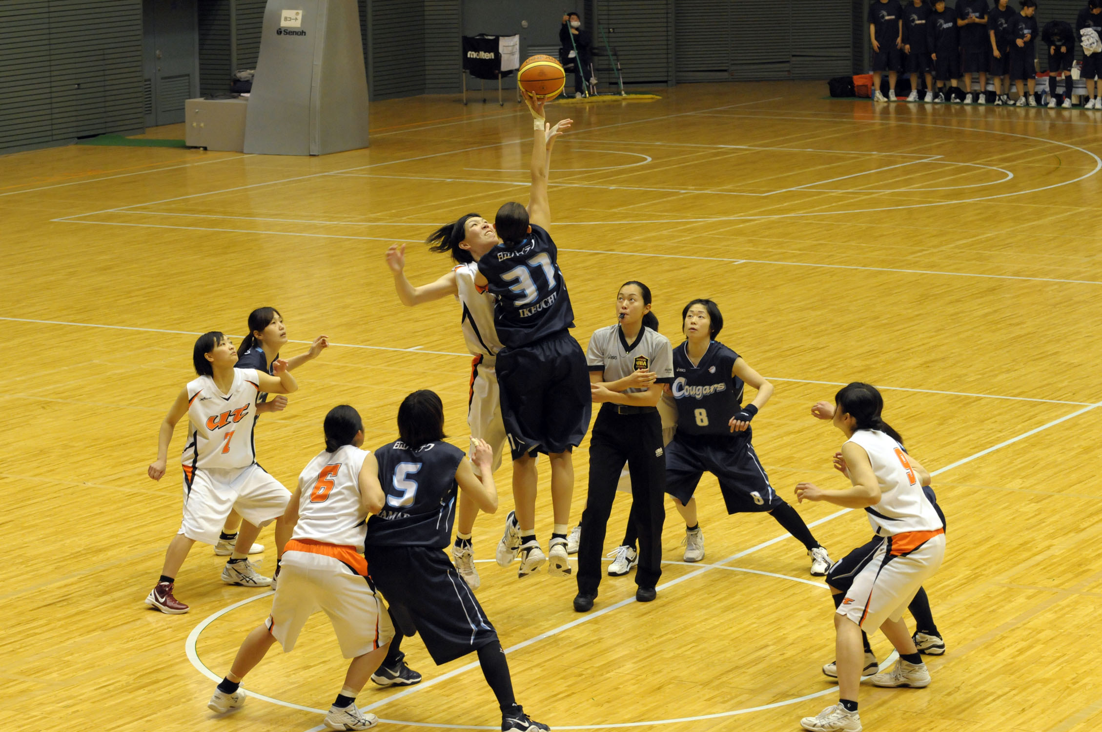 2013年全日本総合バスケットボール選手権大会2回戦、拓殖大学対日立ハイテククーガーズ。駒沢体育館で。